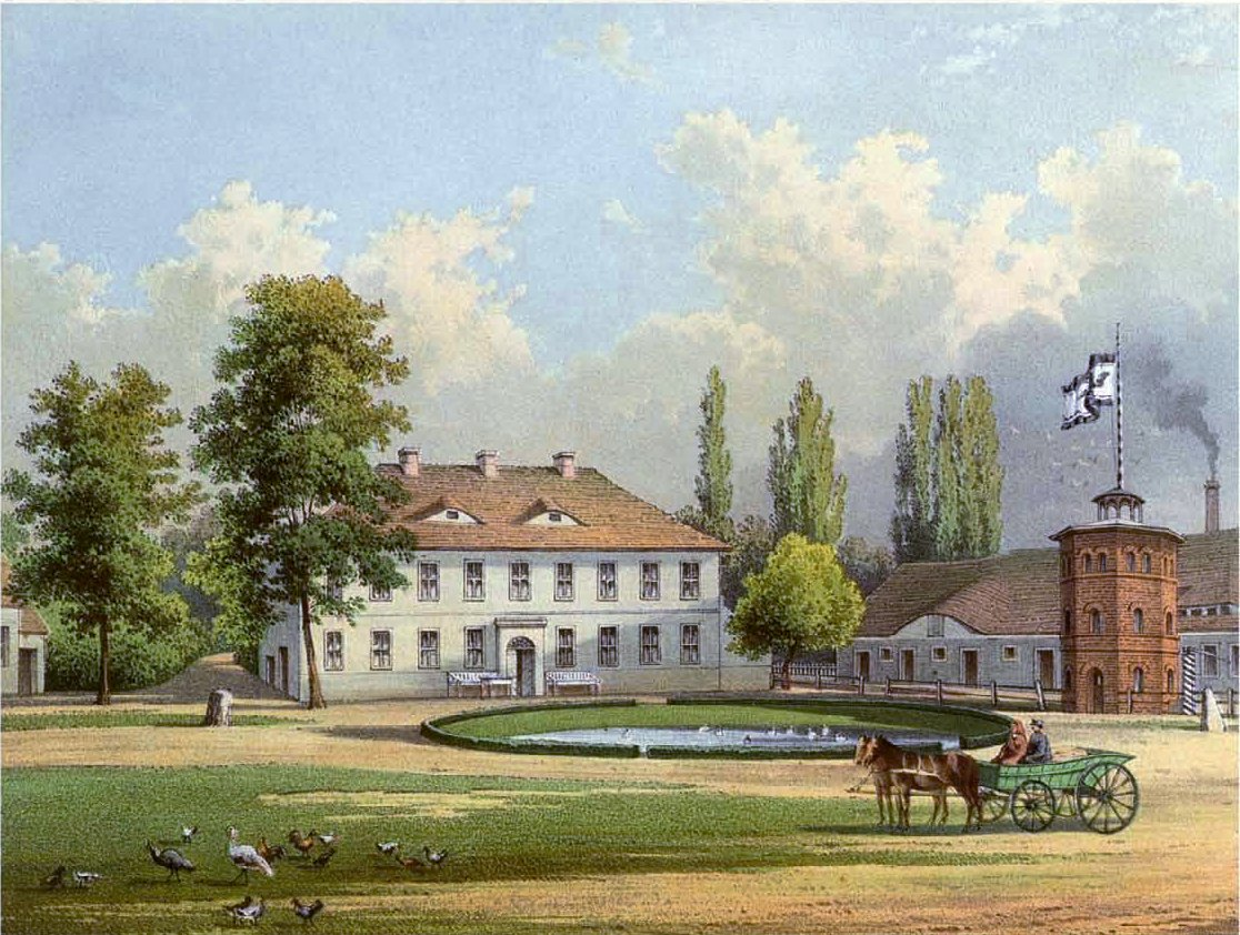 Rittergut Sellendorf, Kreis Luckau, Provinz Brandenburg, Lithografie aus dem 19. Jahrhundert